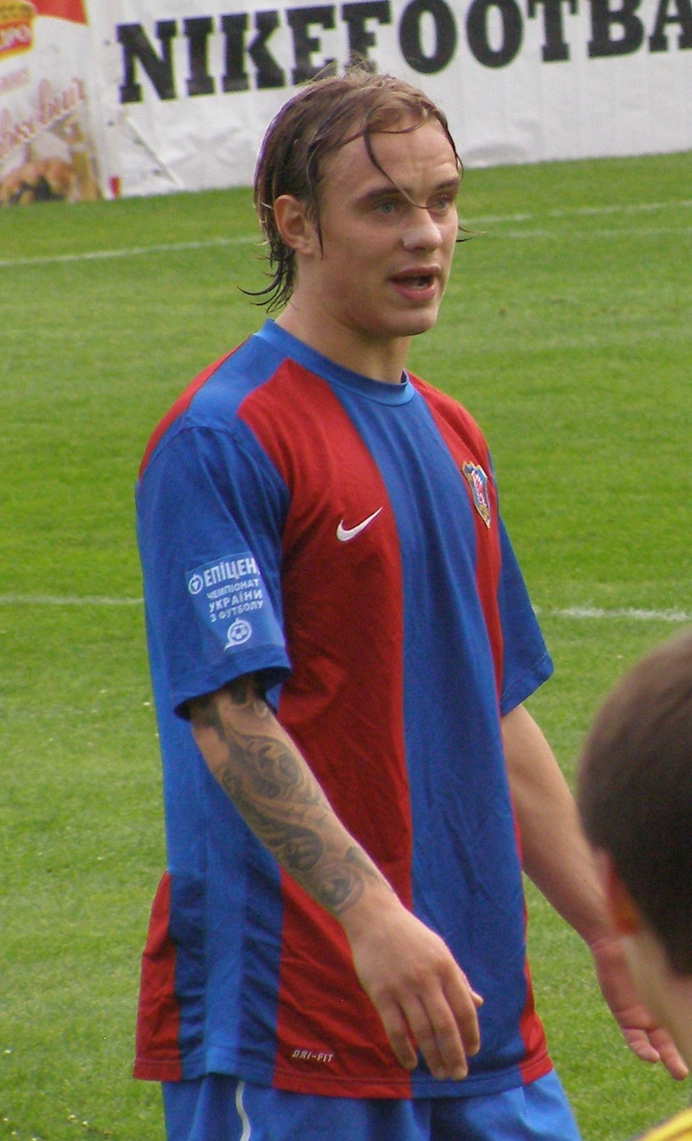 Russischer Fußballspieler Adrej Jestschenko während dem Spiel zwischen Arsenal Kyjiw und Metalist Charkiw